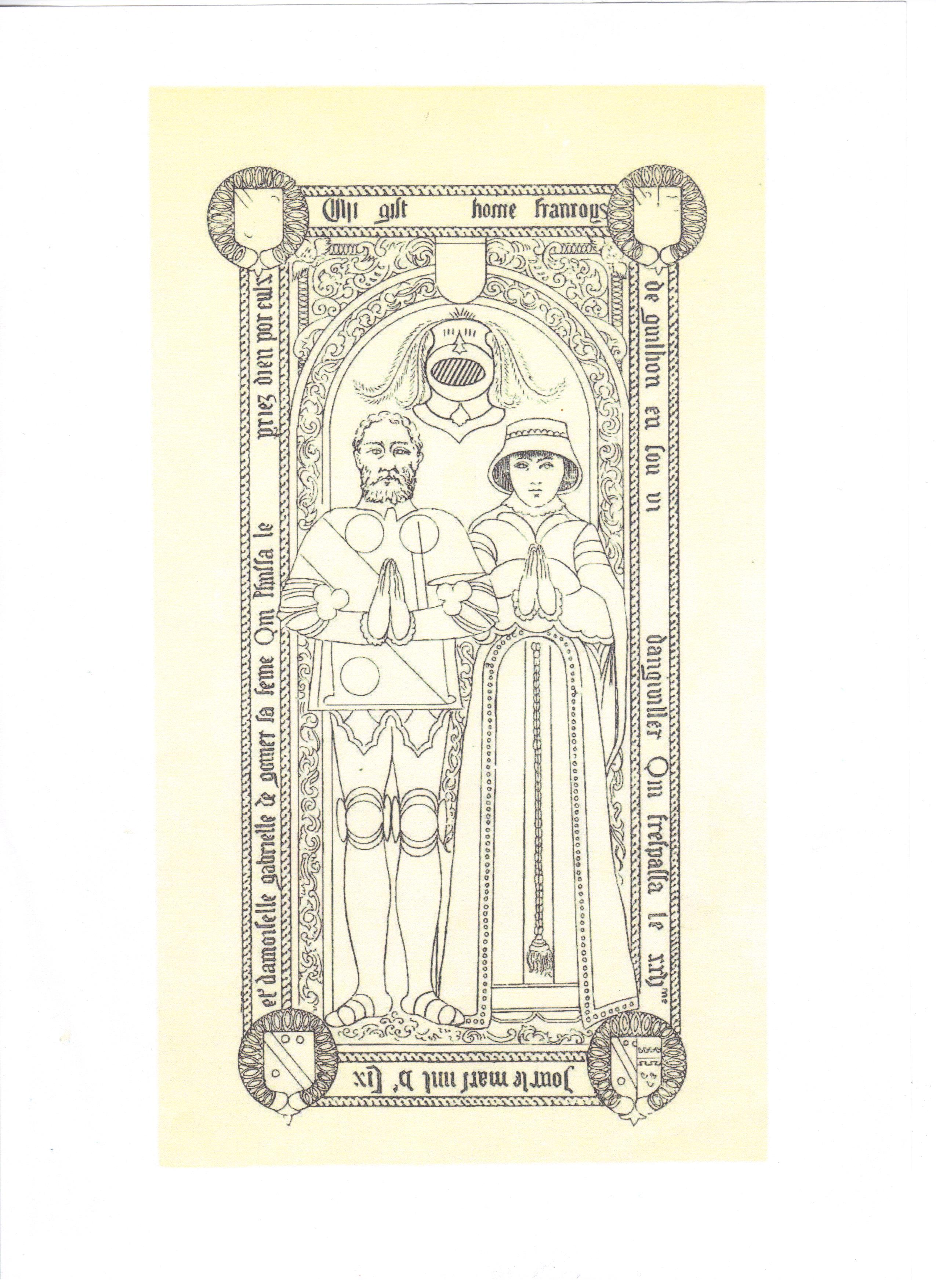 Pierre tombale (XVI siècle) de François de Guillebon et de son épouse Gabrielle de Gomer. Le seigneur d'Angivillers porte sur son armure une cotte armoriée propre aux combattants de retour des guerres d'Italie.